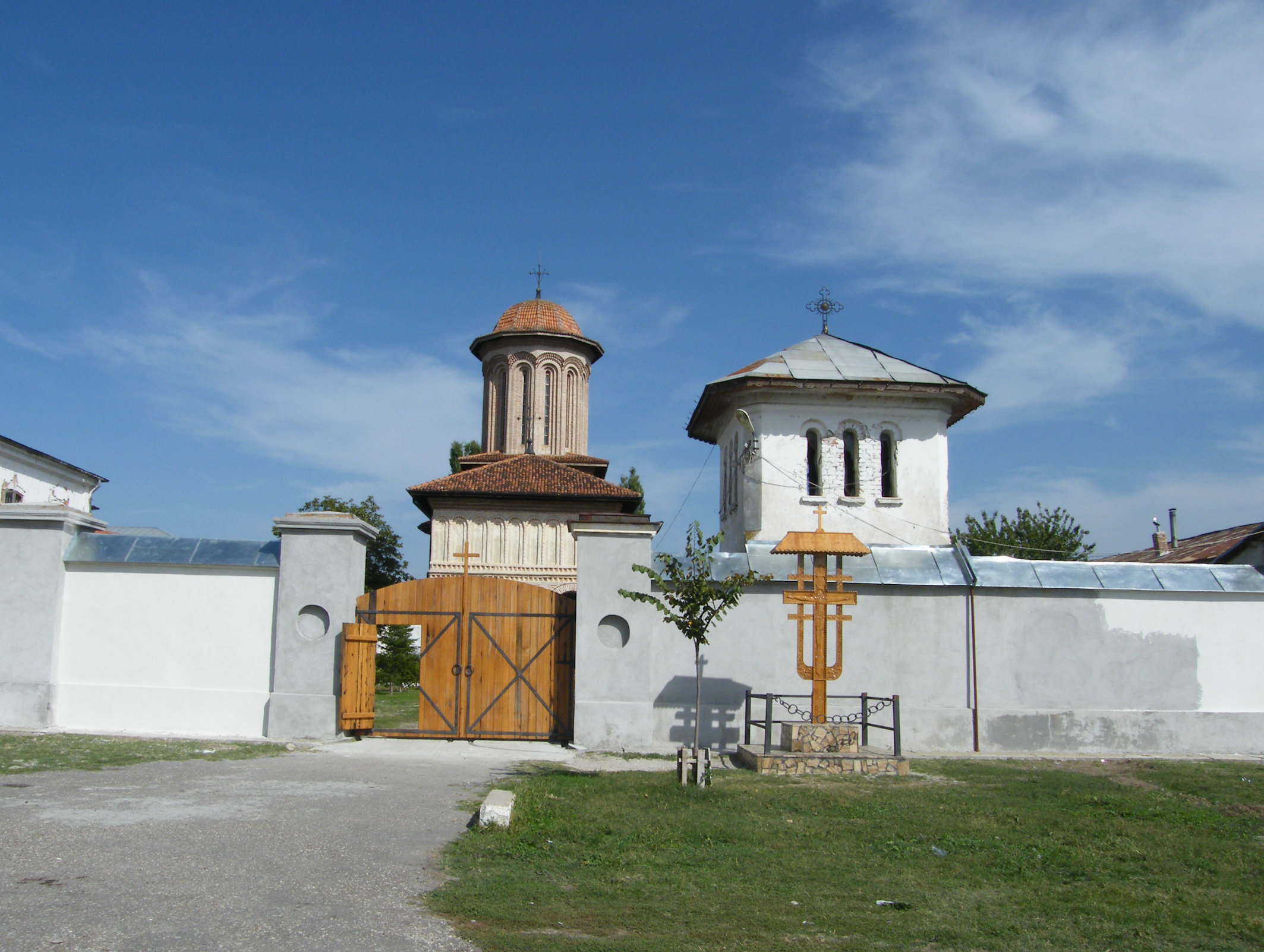 2012 - Mănăstirea Plătăreşti - zidul de incintă cu porţile refăcute şi troiţa ridicată la poartă 05